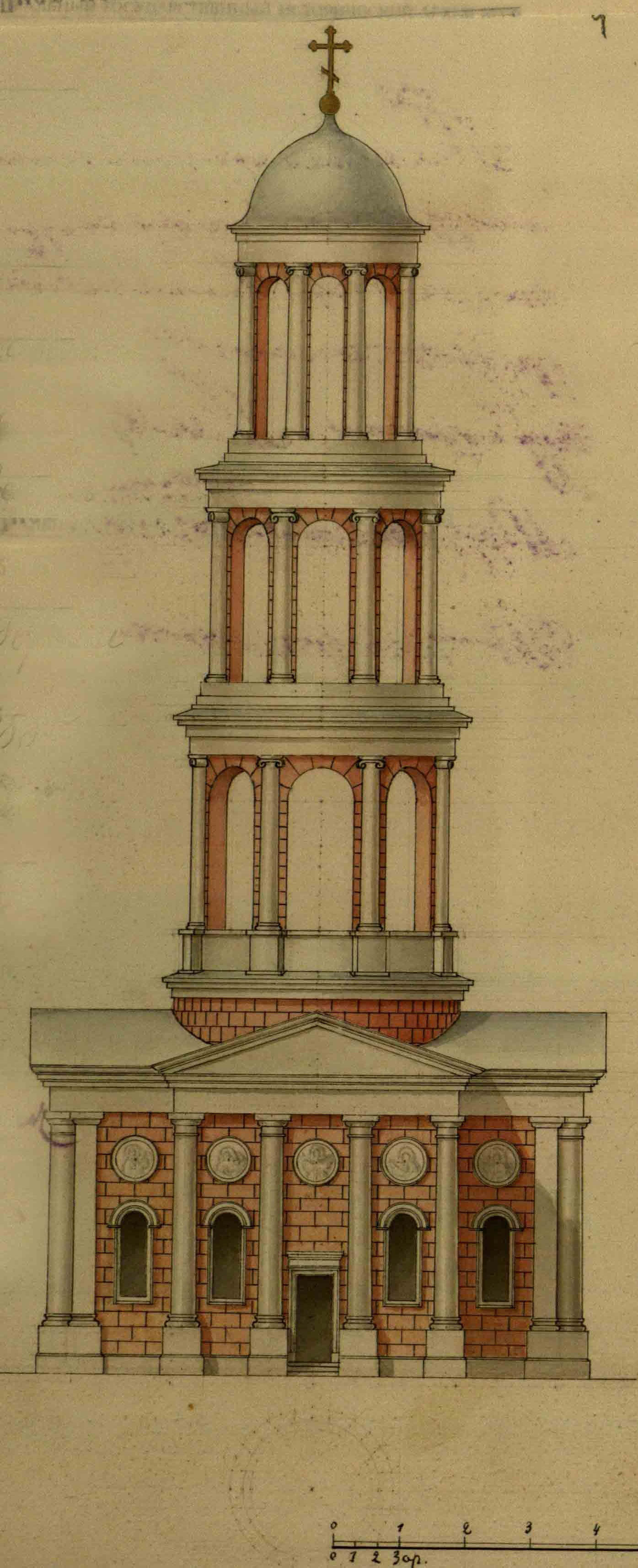 Проект церкви для Лавришевского монастыря (1908/1912г.)